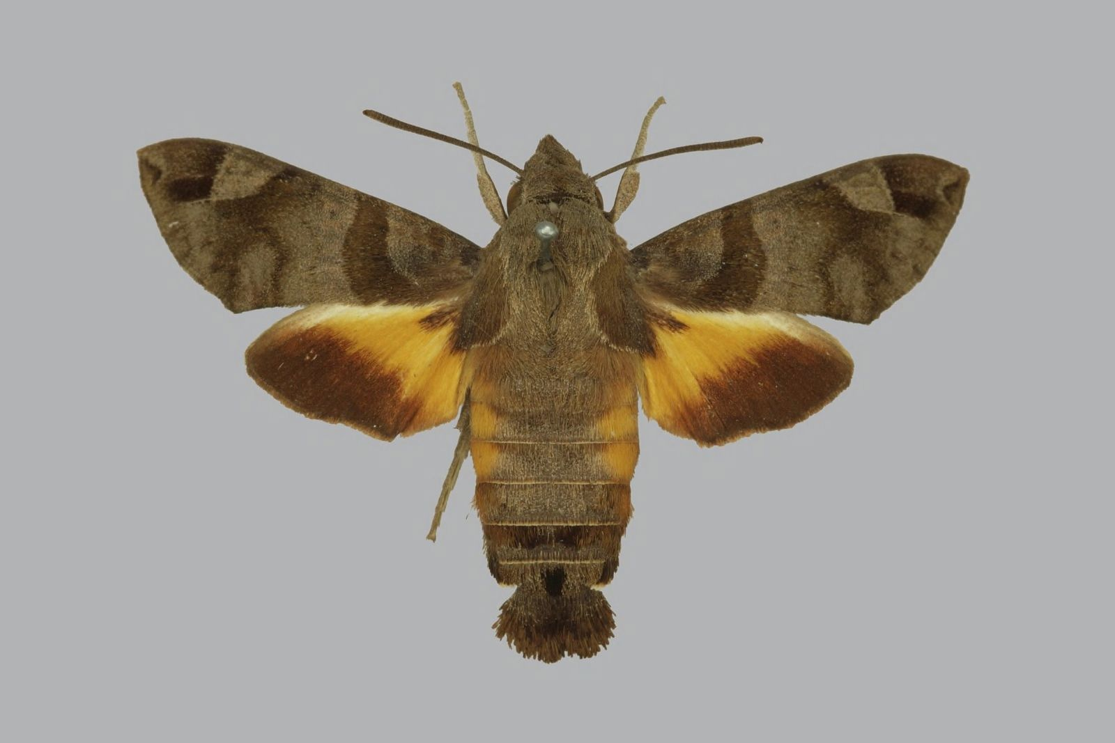 Macroglossum aesalon aesalon, female, upperside. Mauritius, Black River